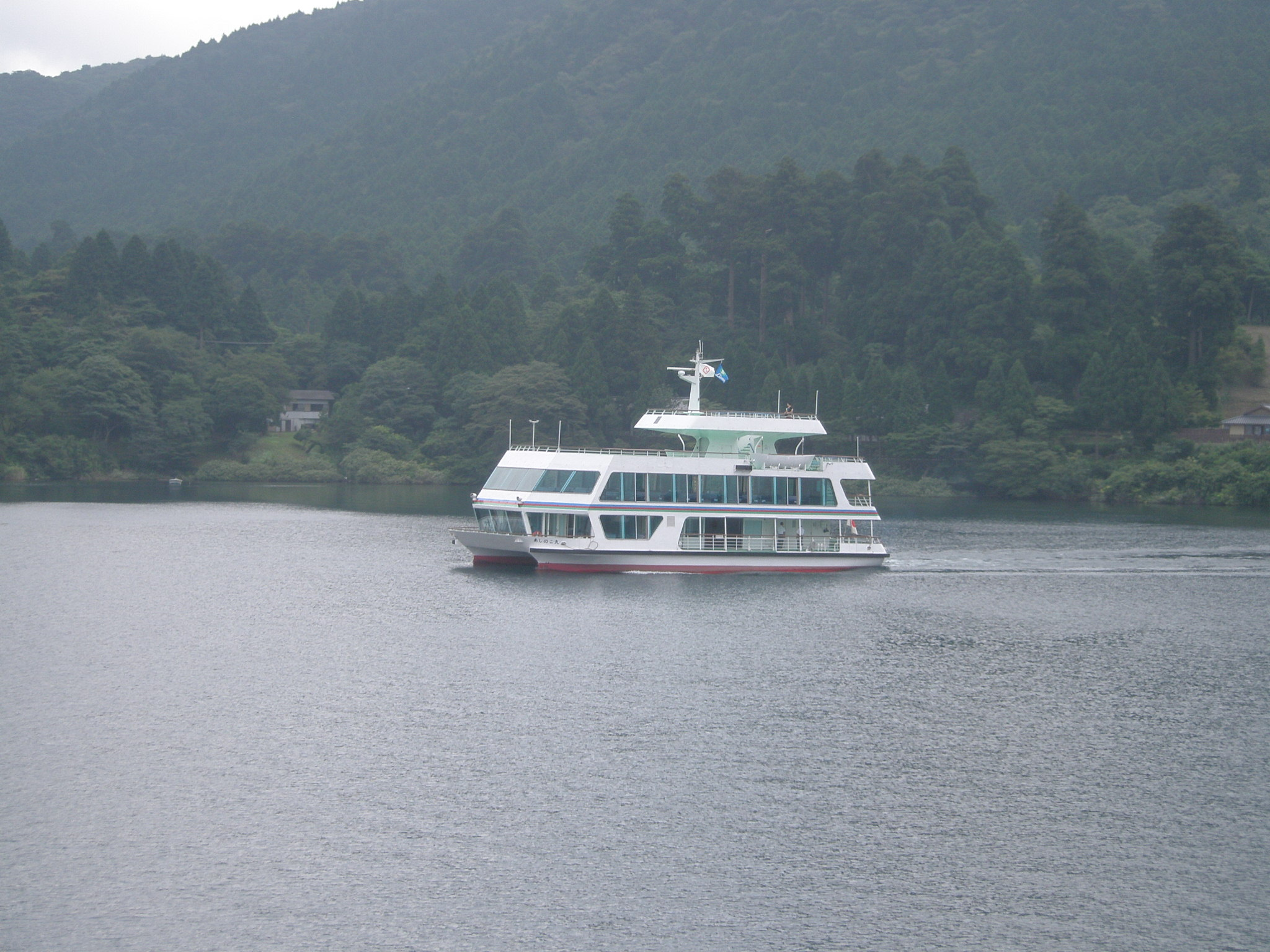 芦ノ湖遊覧船、あしのこ丸